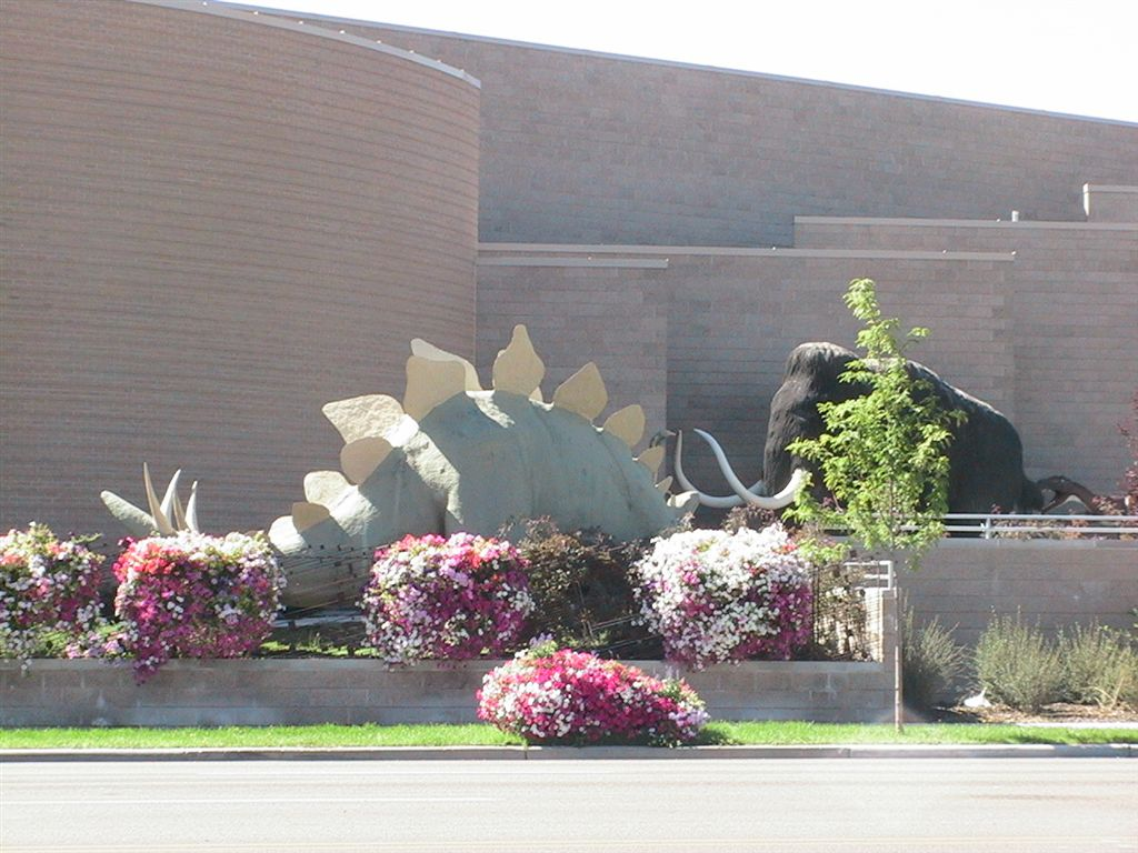 Vernal Dinosaur Museum 08-16-2006